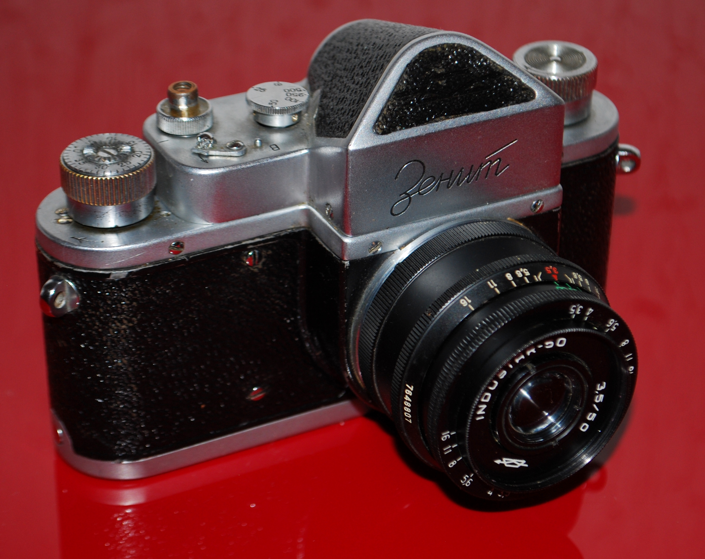 Зенит 52 года